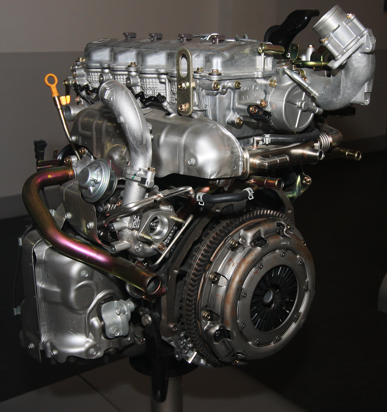 2003 Nissan YD22DDTi engine. L4 2,184cc